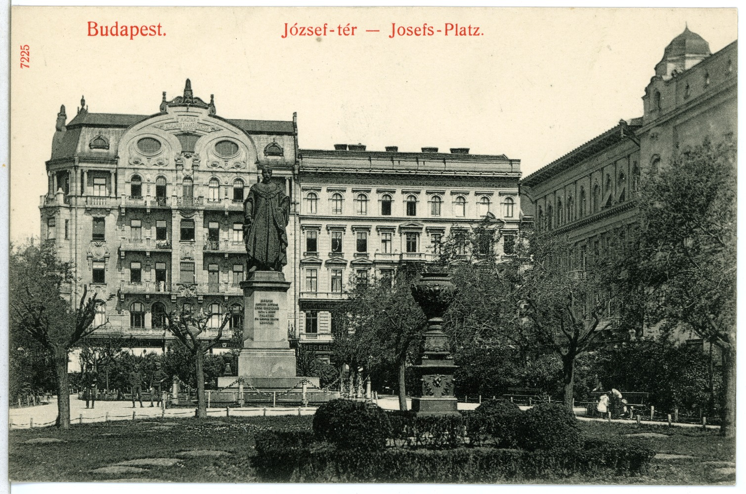 Budapest; Josefsplatz This postcard is from publisher Brück & Sohn in Meißen ( postcard has a unique number 07225 and is available in a higher resolution at the publisher. This images was uploaded in a cooperation project between Wikipedians and the publisher.